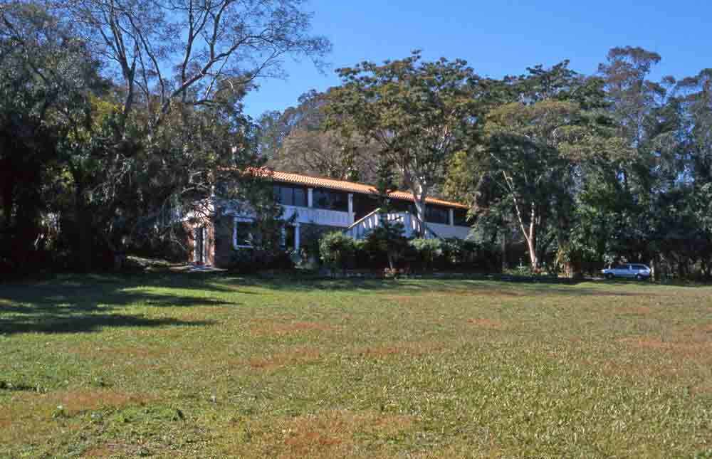 Emil Hassler. Casa construida por él en 1898 en el lugar denominado Bierschlucht en San Bernardino, Dep. Cordillera, Paraguay.